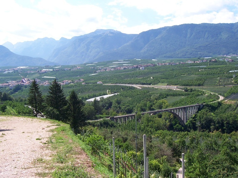 Cles - Ponte Ferrovia Trento-Malè